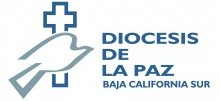 Logotipo Diocesis de La Paz